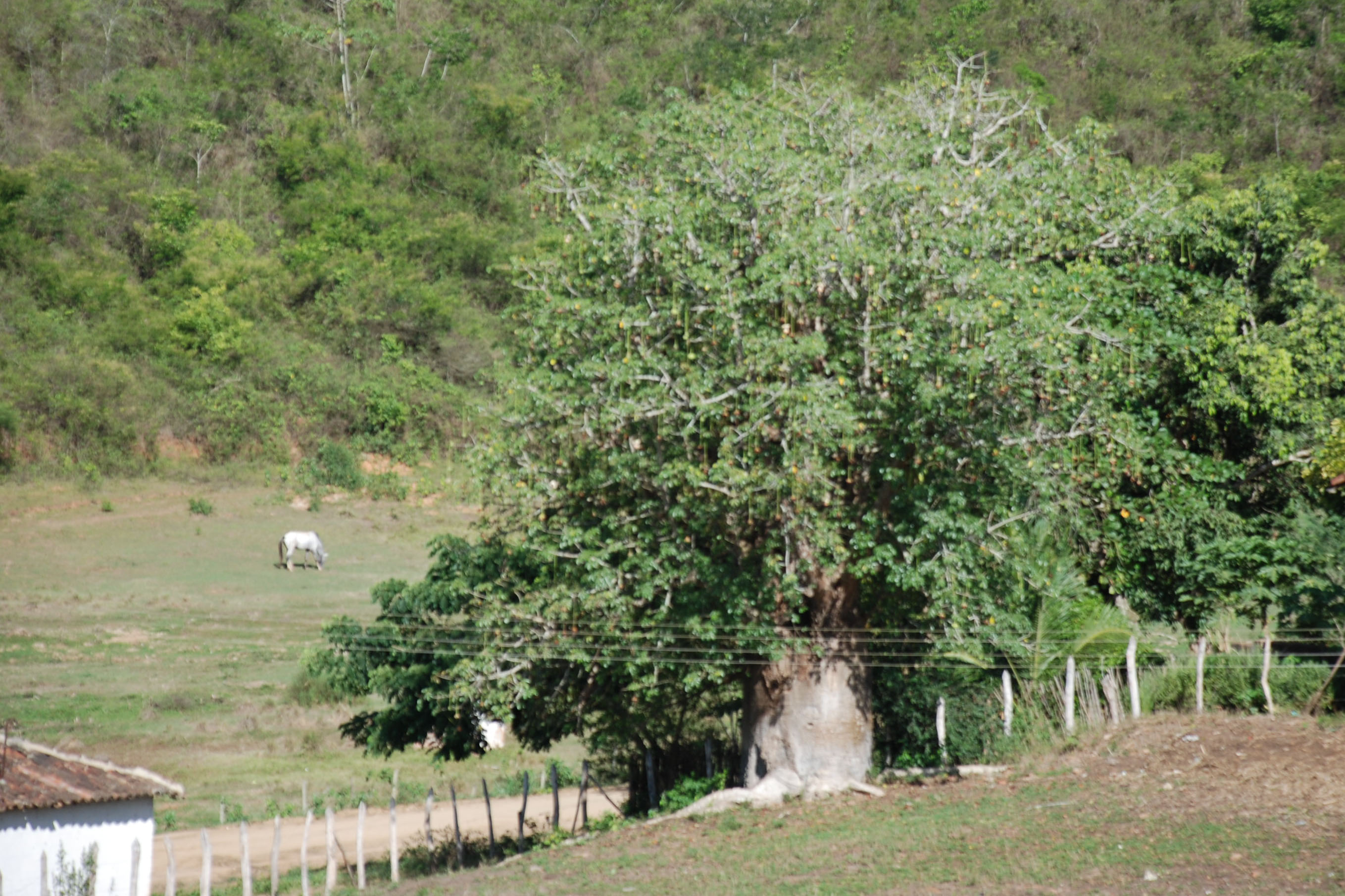 Baobá na propriedade Engenho Poço Comprido, Vicência, Pernambuco, Brasil.